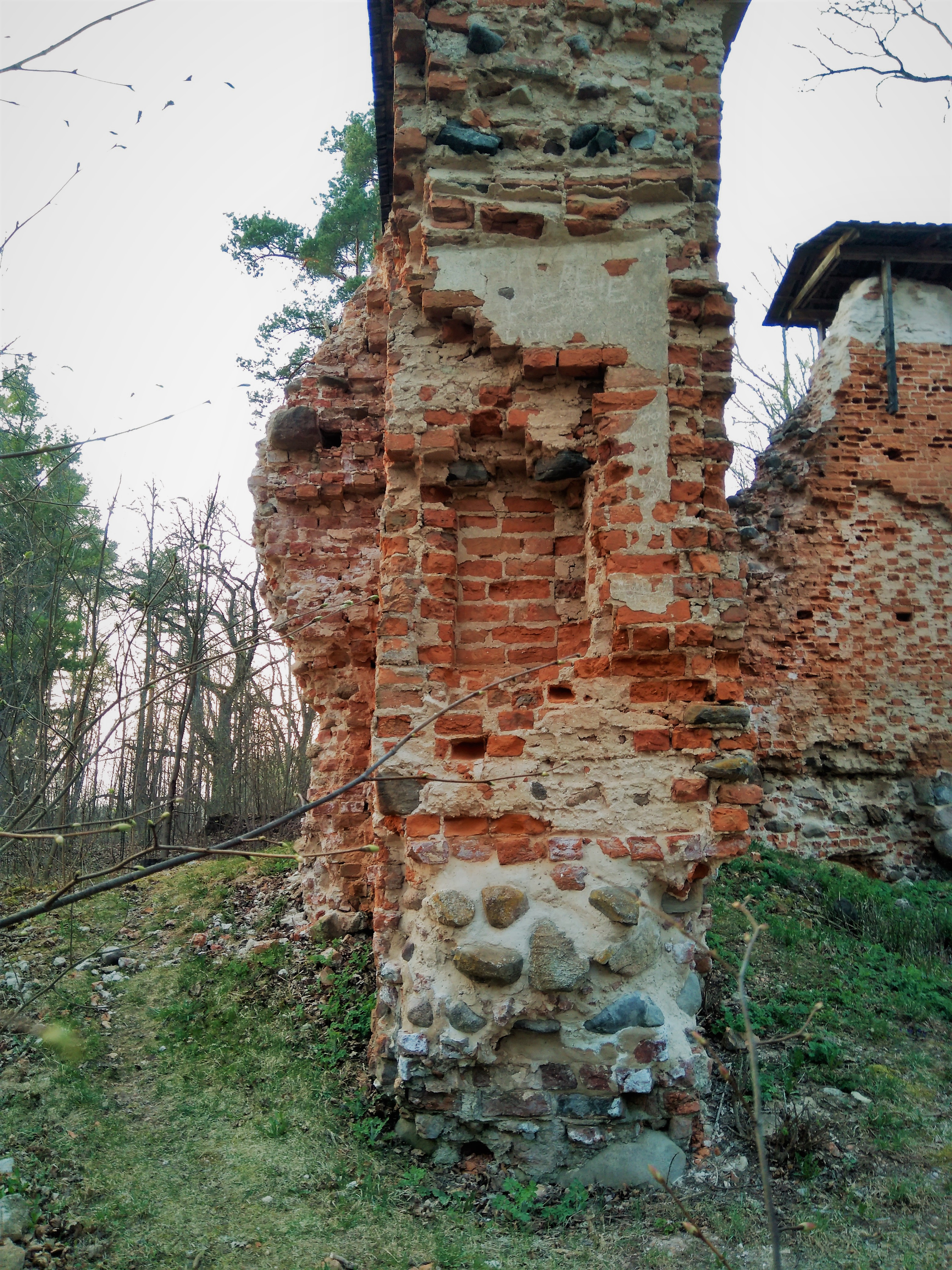 Vaade pealinnuse kirdeseinale ja selles säilinud kõrgele laskeavale kagusuunast.